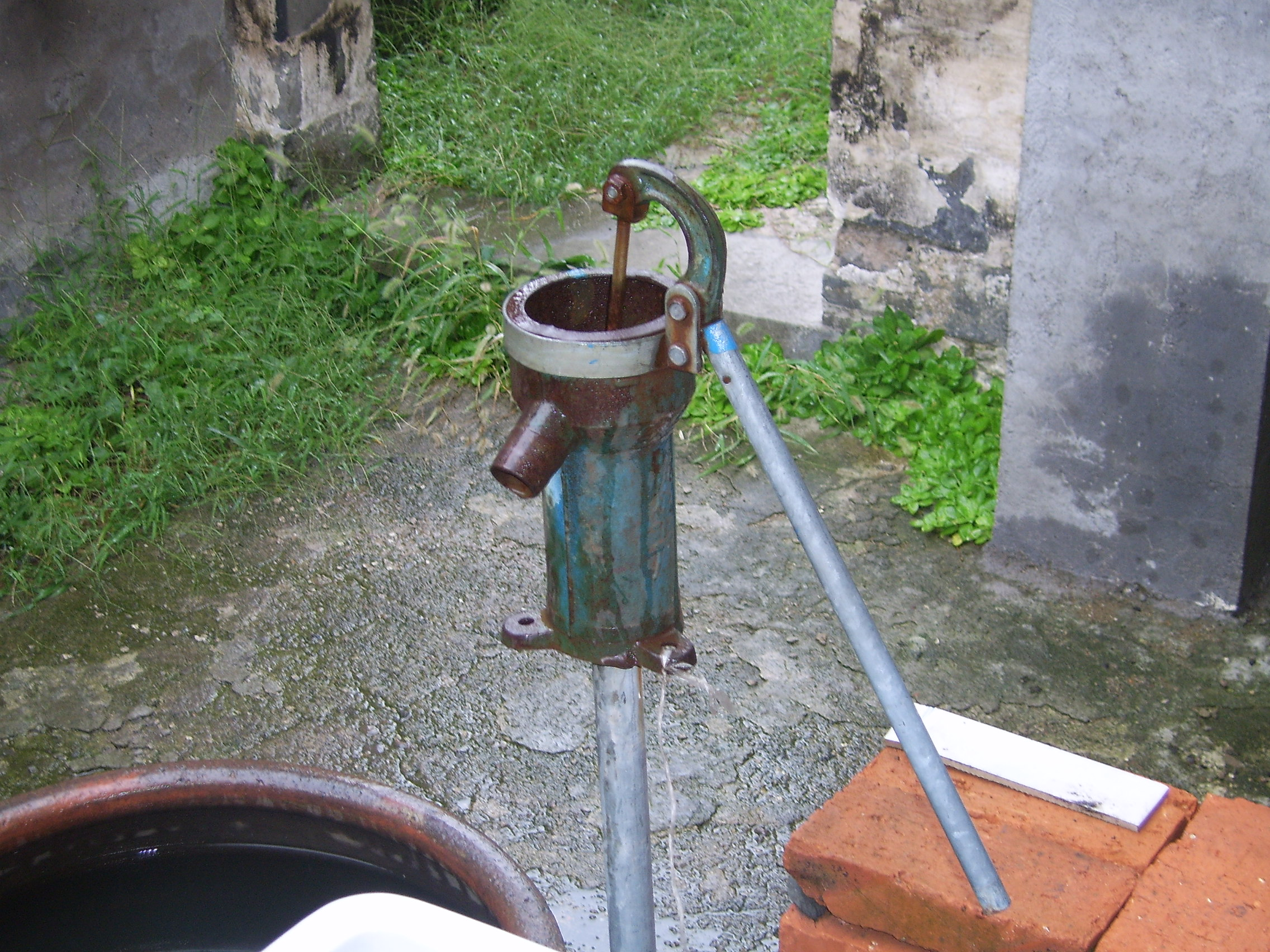 老式的压水的自来水设施。在一些农村还可以看到。